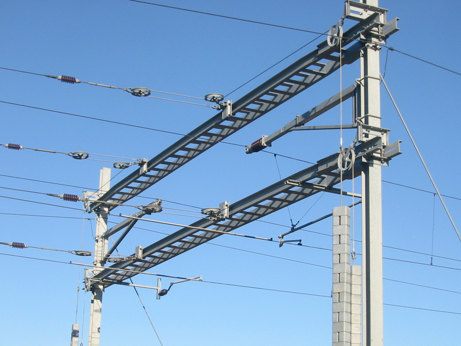 Oberleitung bei den SBB, fotografiert von Benutzer:Filzstift am 25.12.2004